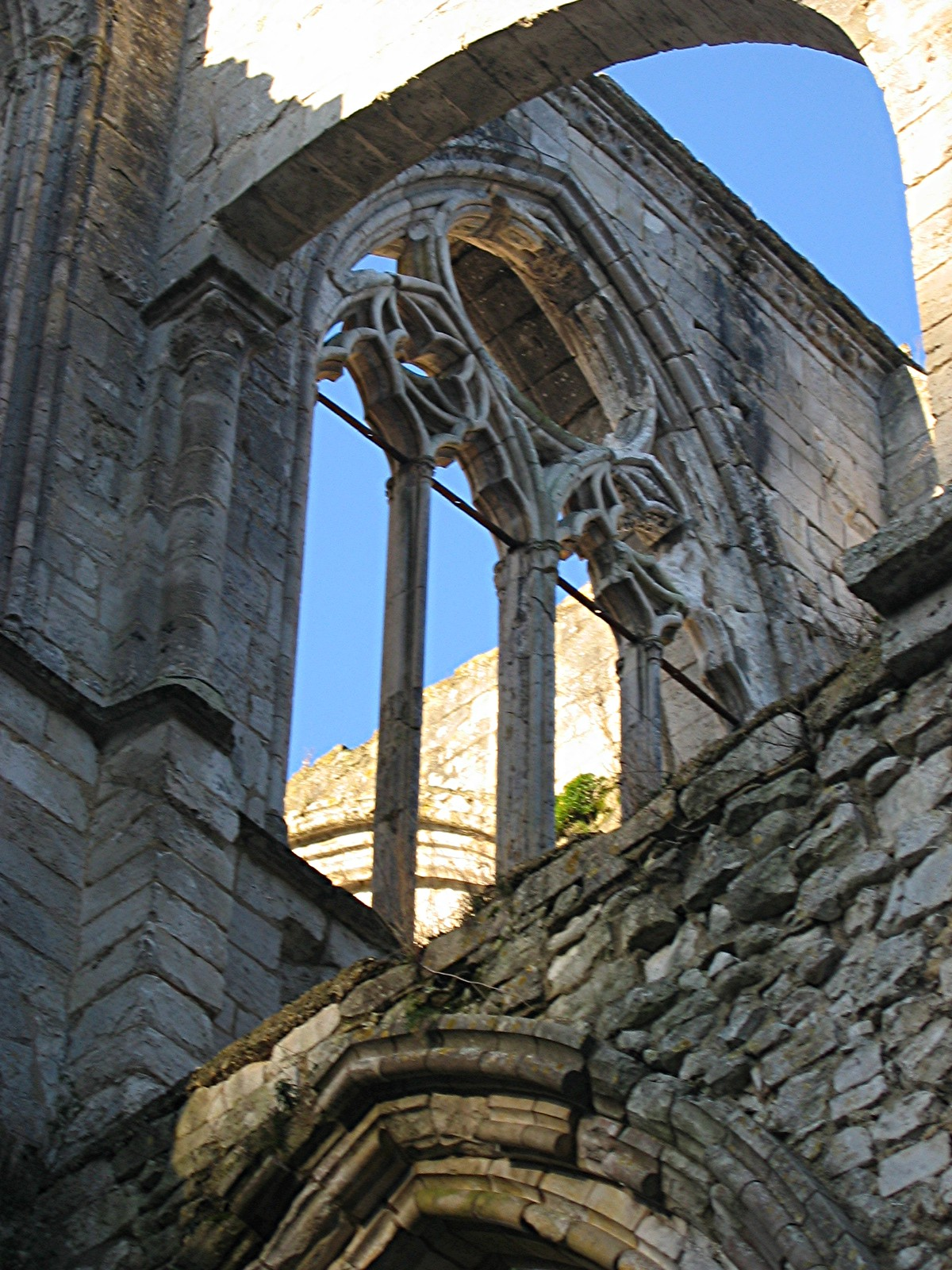 Abbaye de Saint-Wandrille, Seine-Maritime, Haute-Normandie / Photographie personnelle prise par Urban, décembre 2004/ GFDL Urban